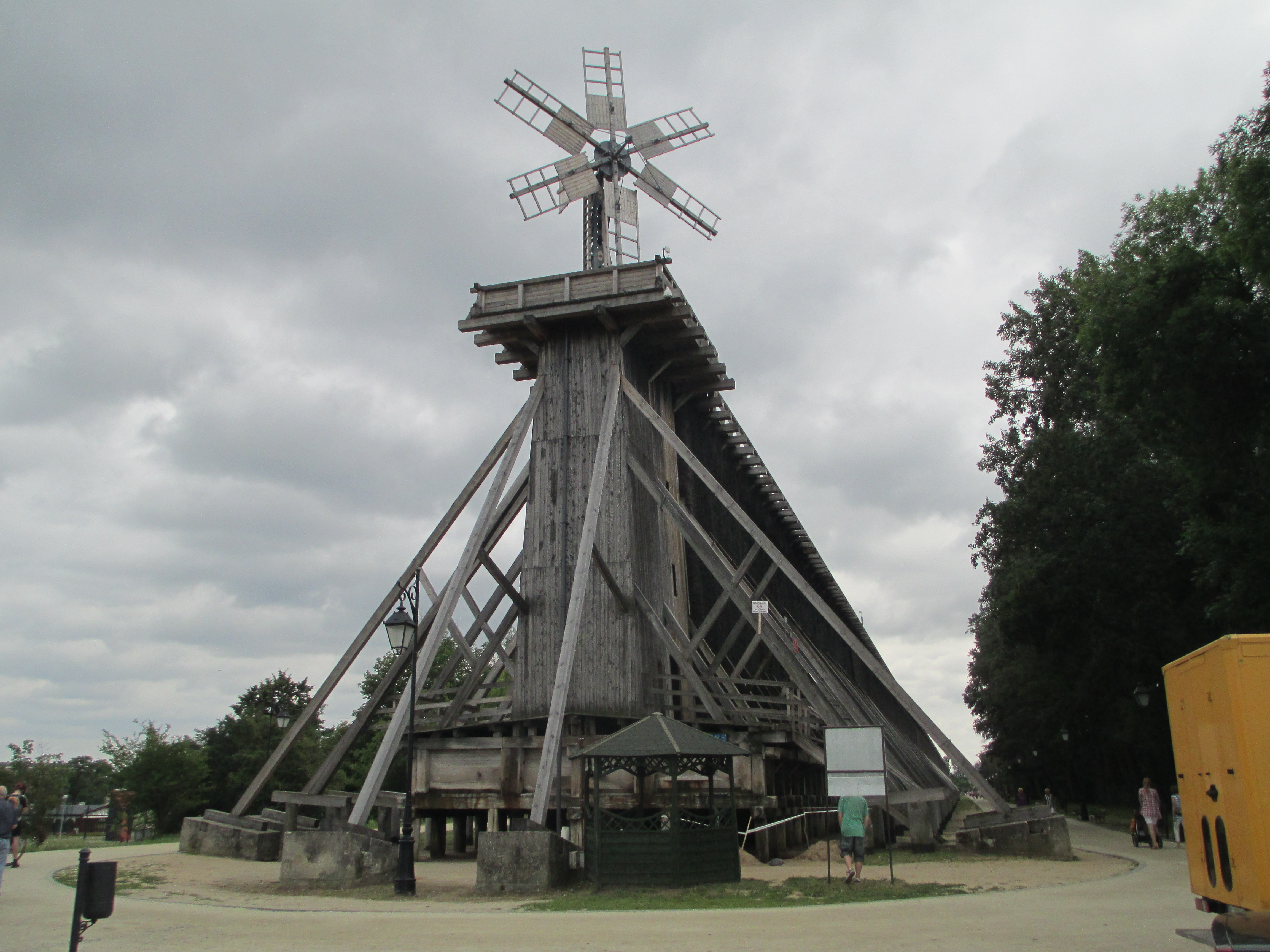 מגדל אידוי בצ'יחוצ'ינק